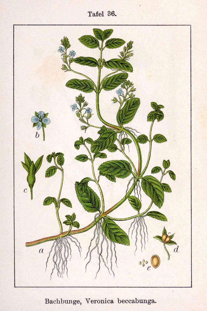 Veronica beccabunga L. Original Description Bachbunge, Veronica beccabunga